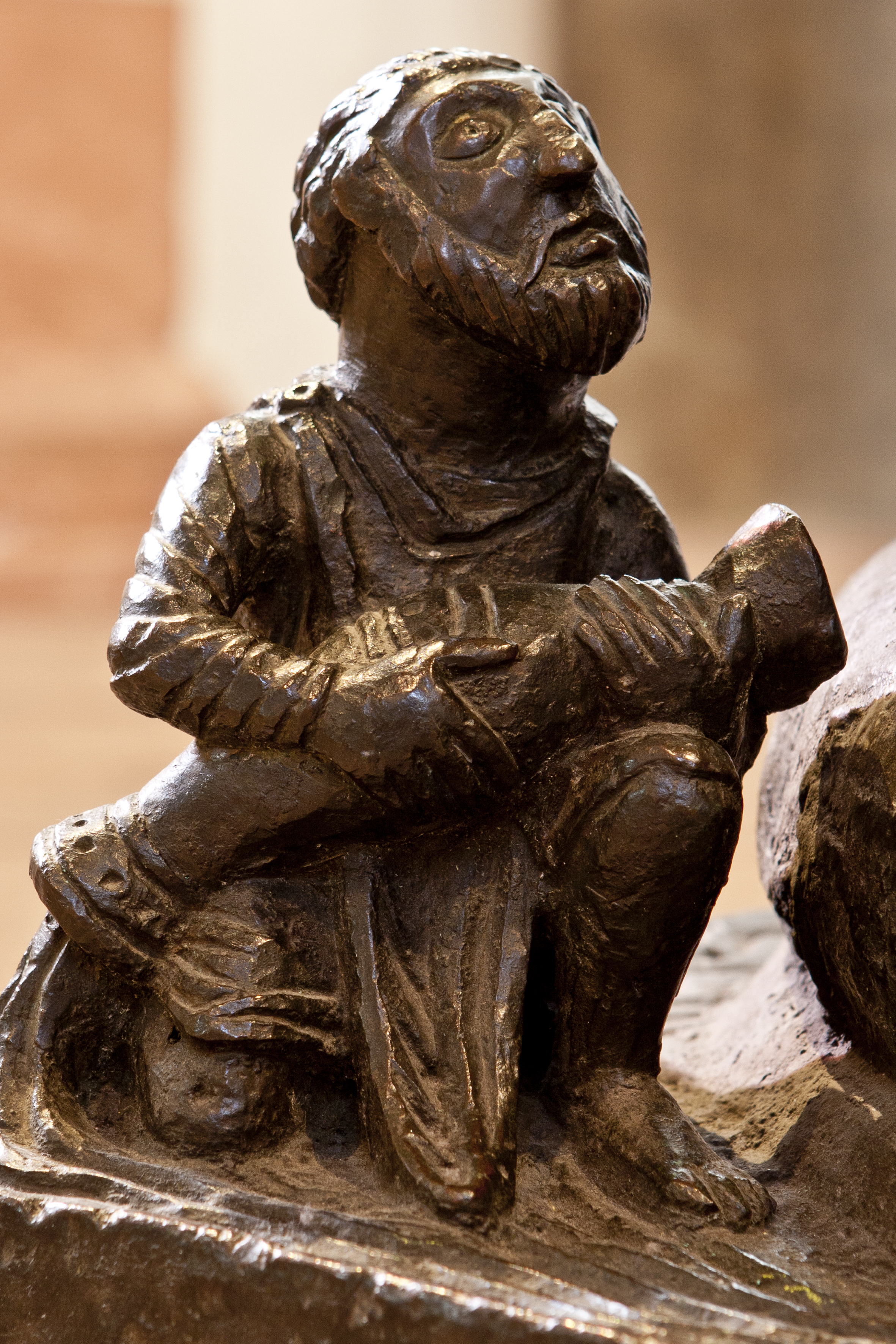 Paradiesfluss am Sockel der Christussäule